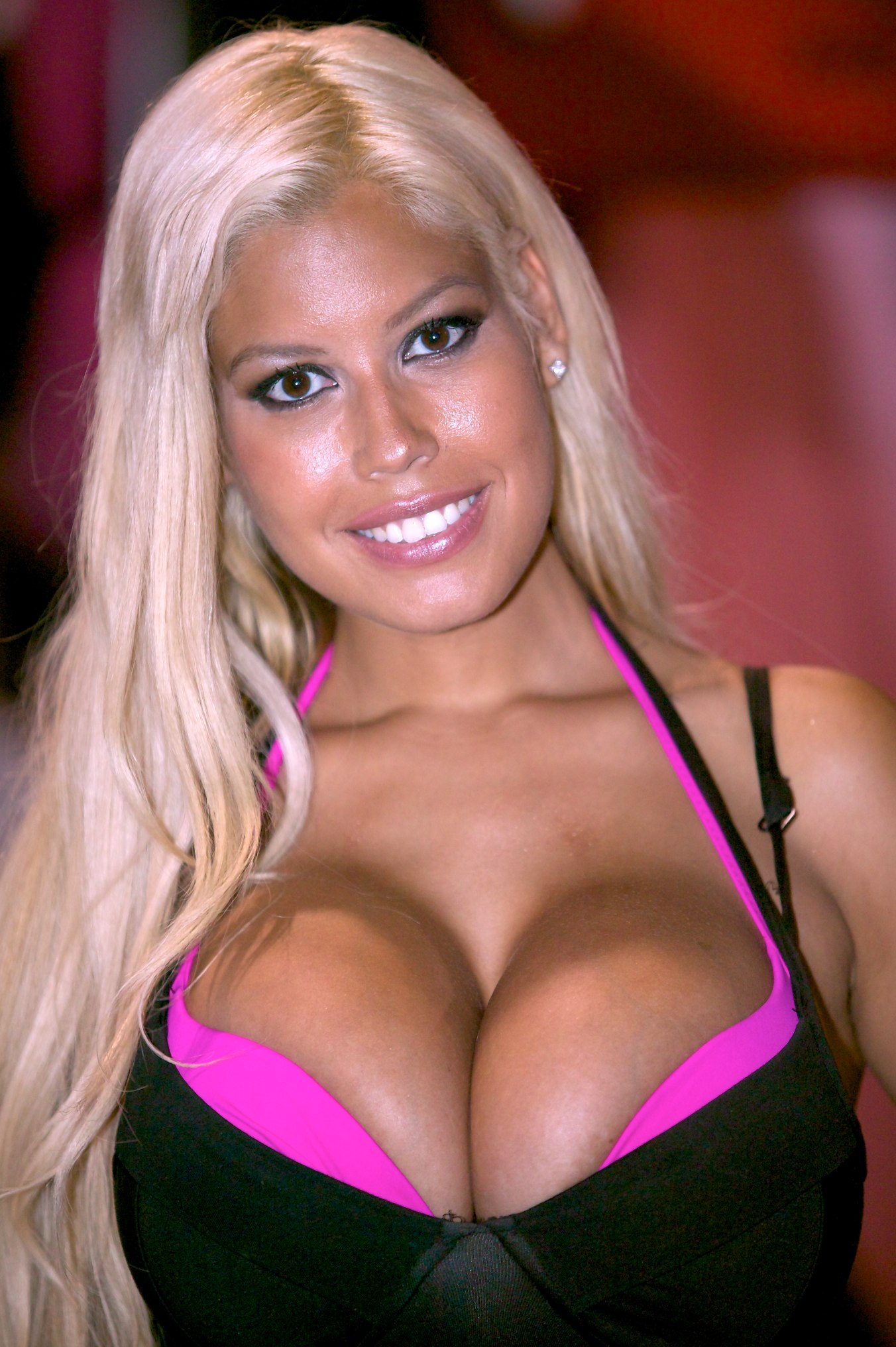 Bridgette B at Exxxotica Miami 2011